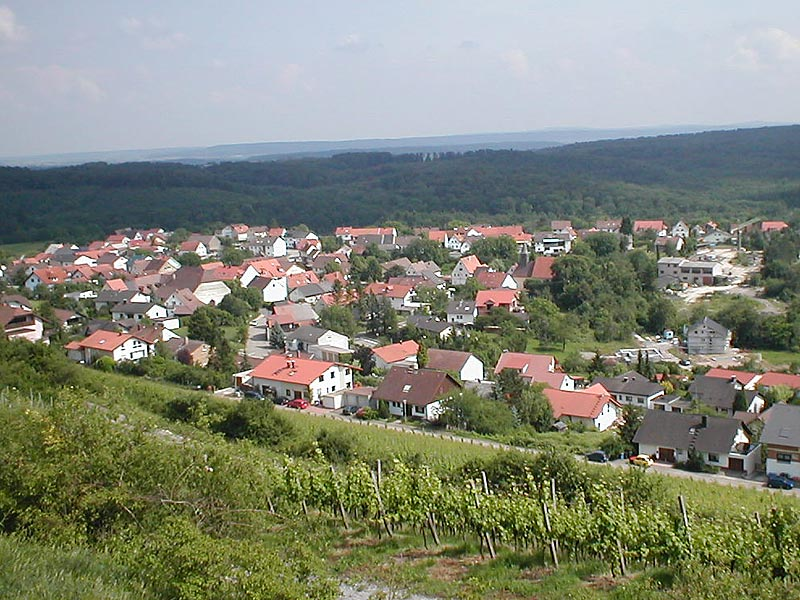 Blick von der Michaelskapelle über Östringen-Eichelberg. Links die alte Kelter, dahinter das Rathaus. Rechts die kath. Kirche